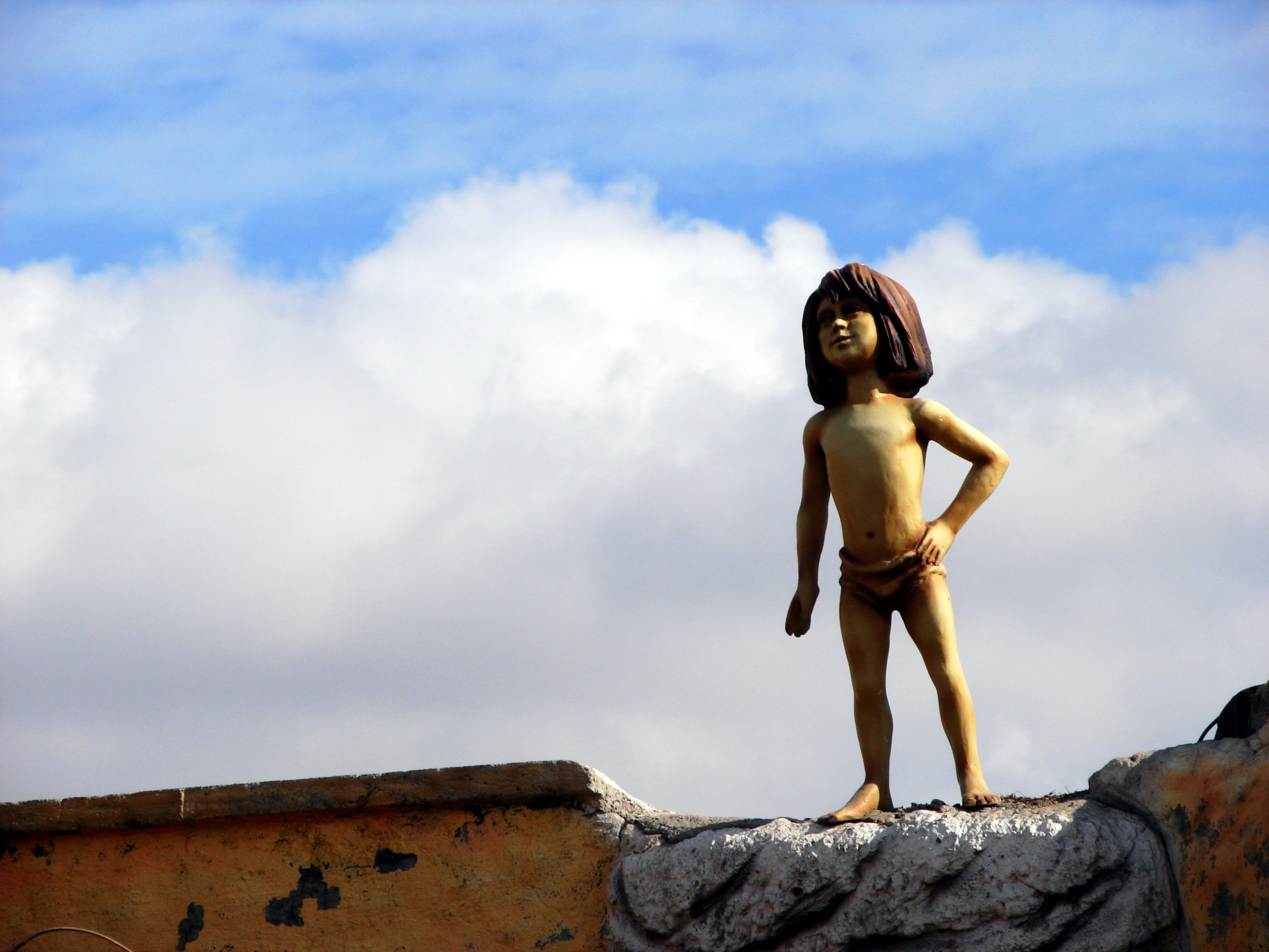 Ankara Amusement Park